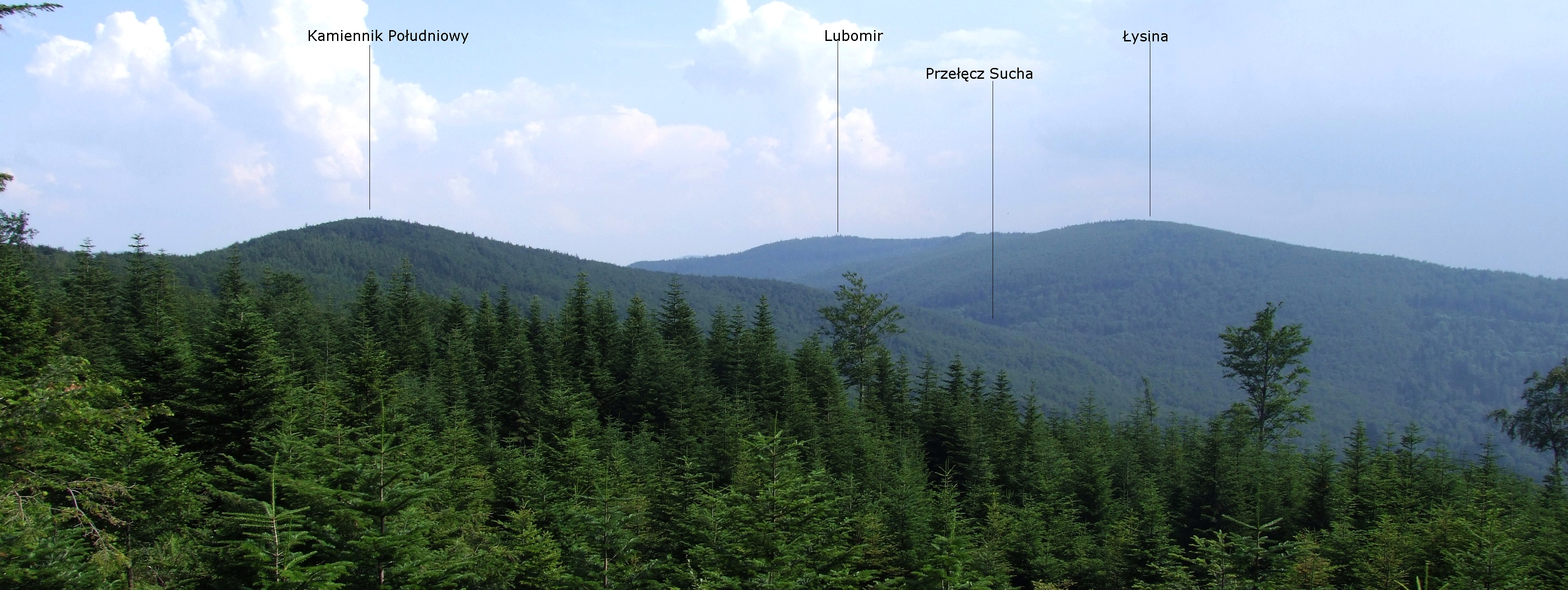 Widok z Kamiennika Północnego na Pasmo Lubomira i Łysiny